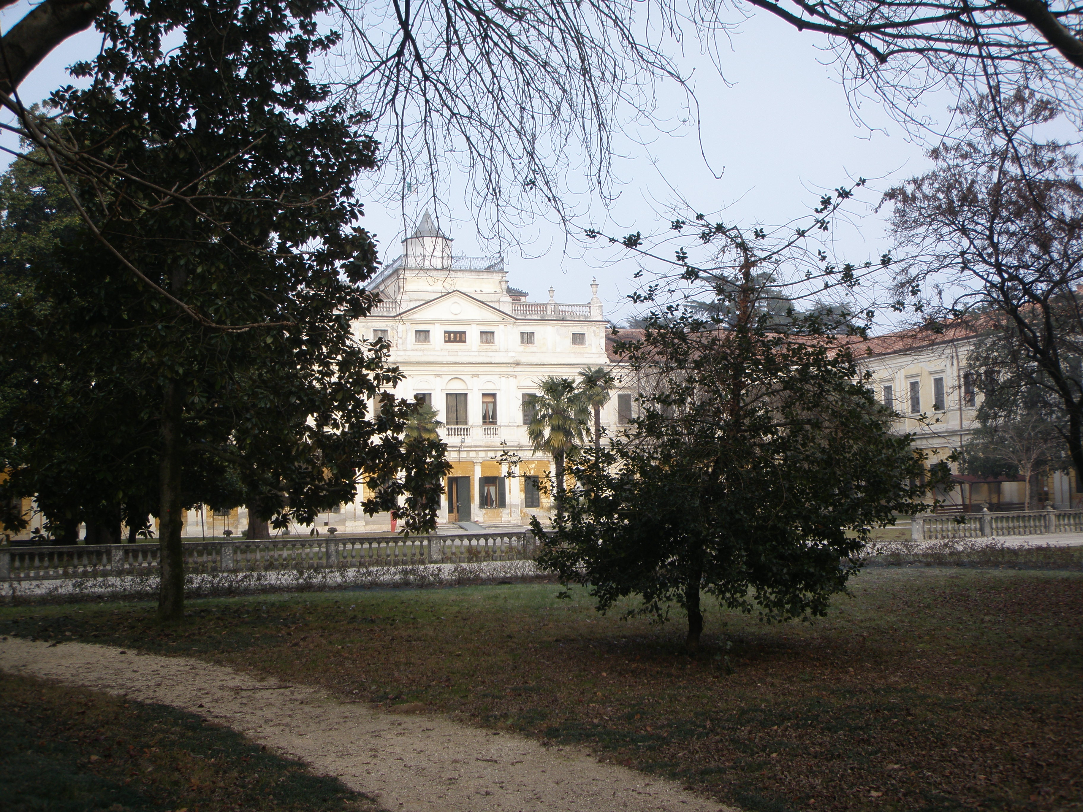 facciata villa imperiale